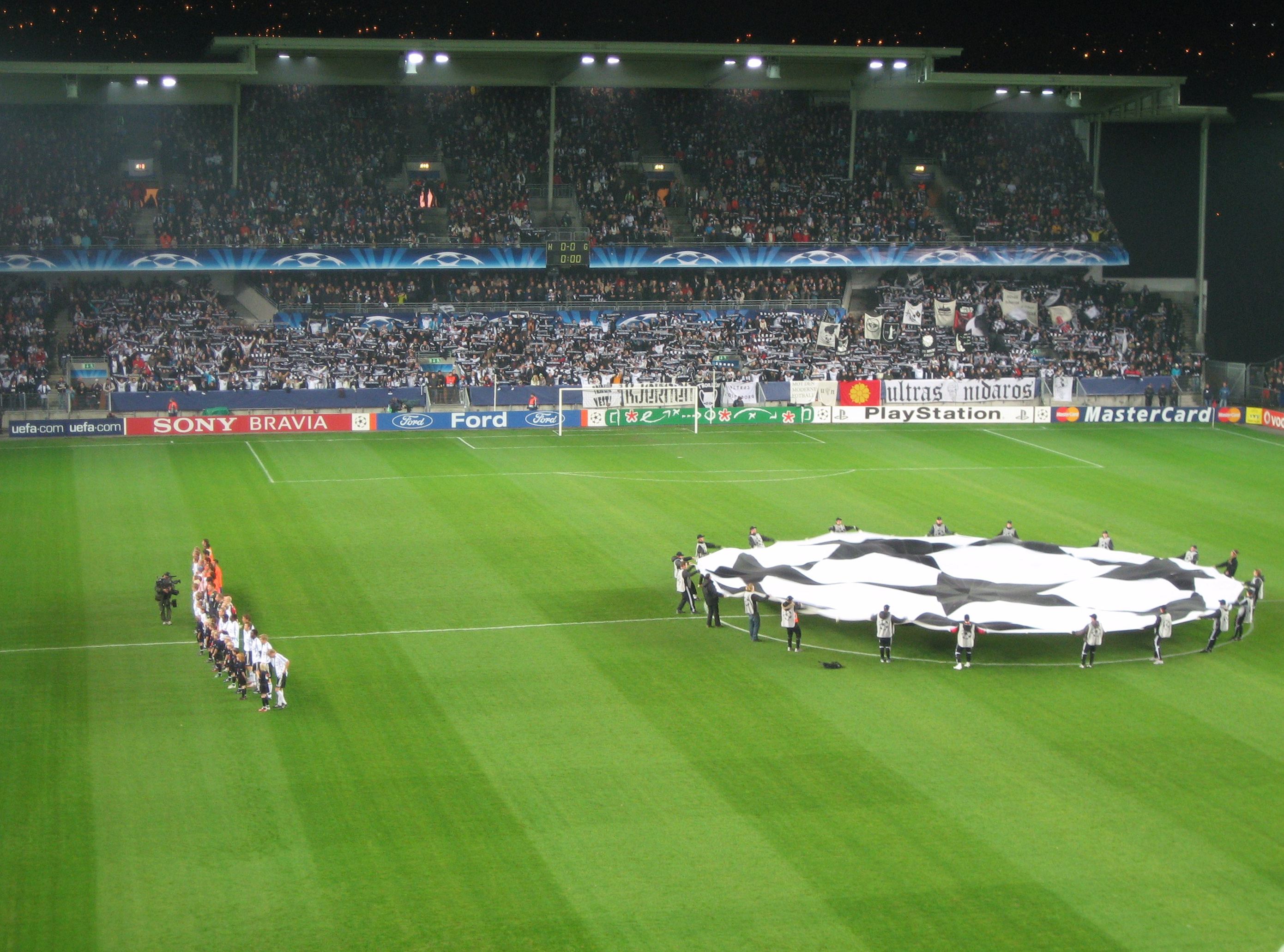 RBK - Valencia (2-0, 24/10/2007)